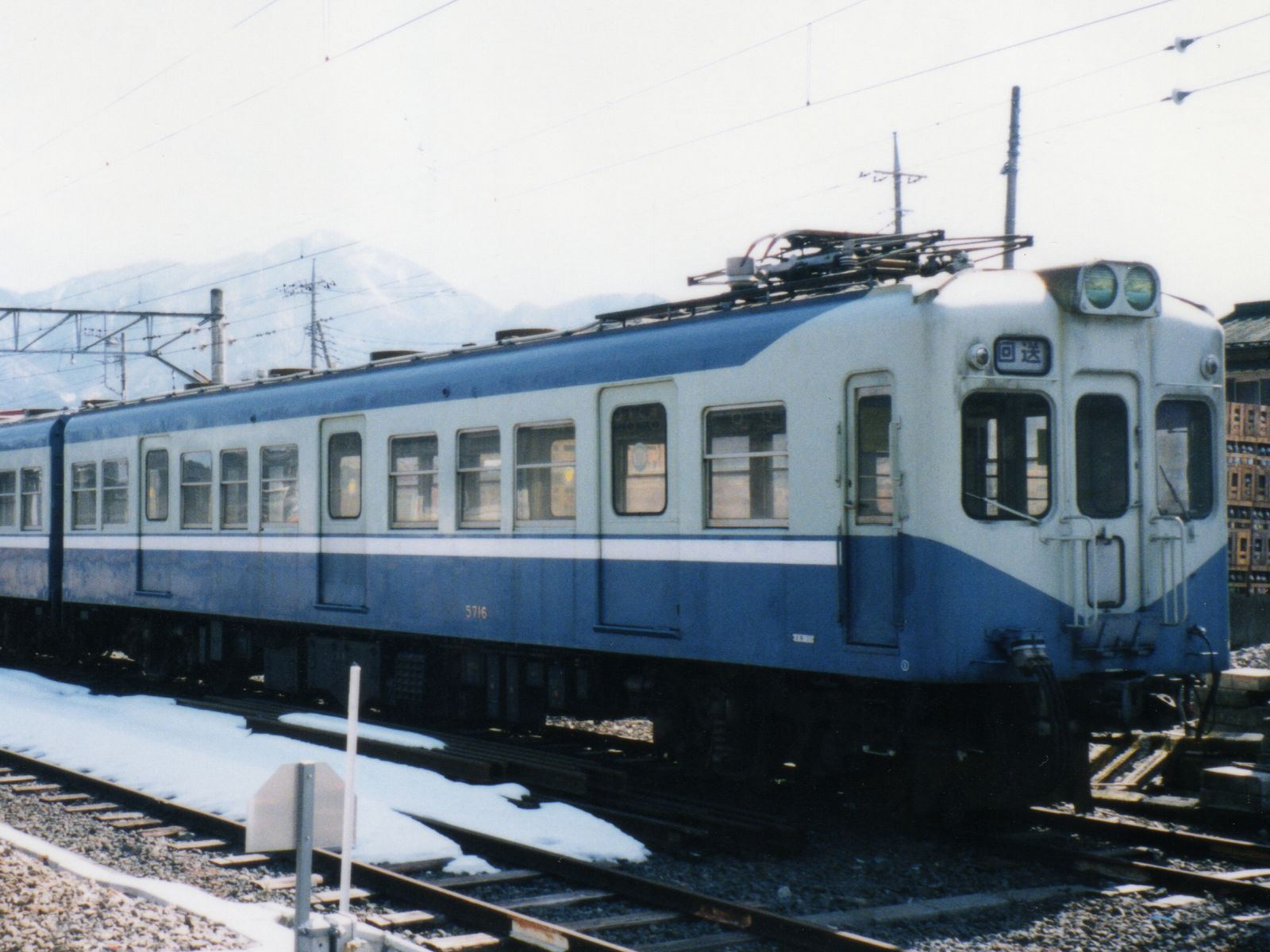 Fujikyuko Co., EMU type 5700 from Odakyu 2320 at Shimoyoshoda Sta.